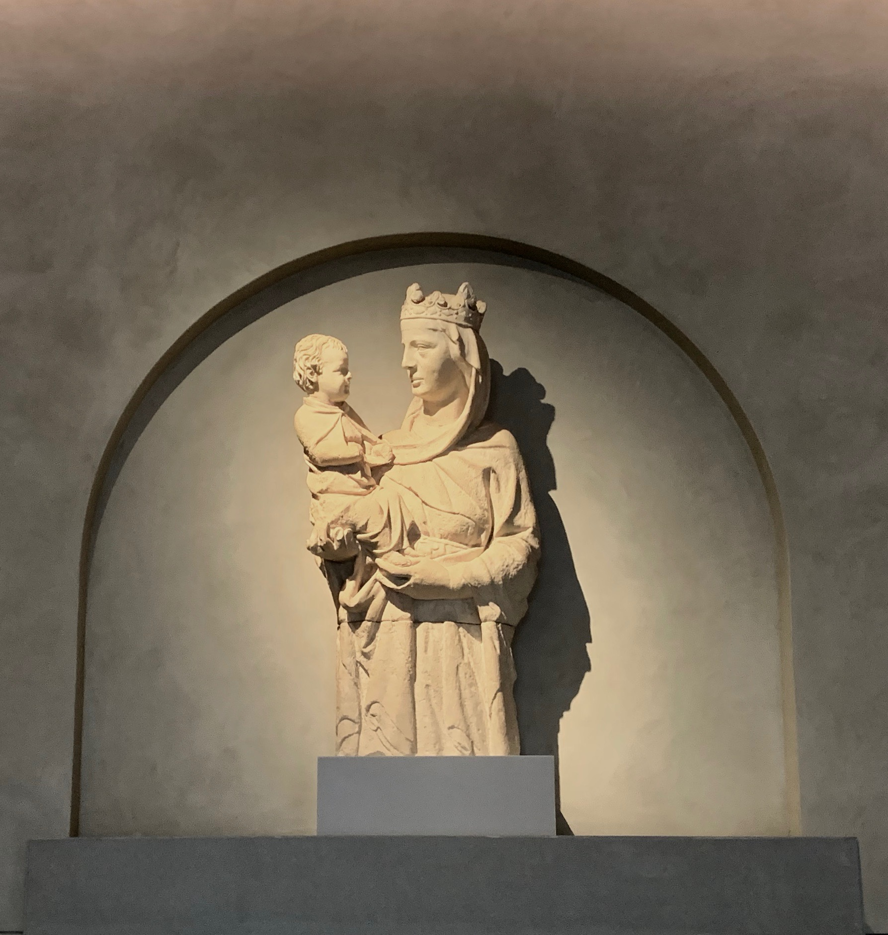 Madonna col Bambino detta Madonna del colloquio di Giovanni Pisano (marmo - 1280-84 ca.) esposta al nuovo Museo dell'Opera del Duomo di Pisa